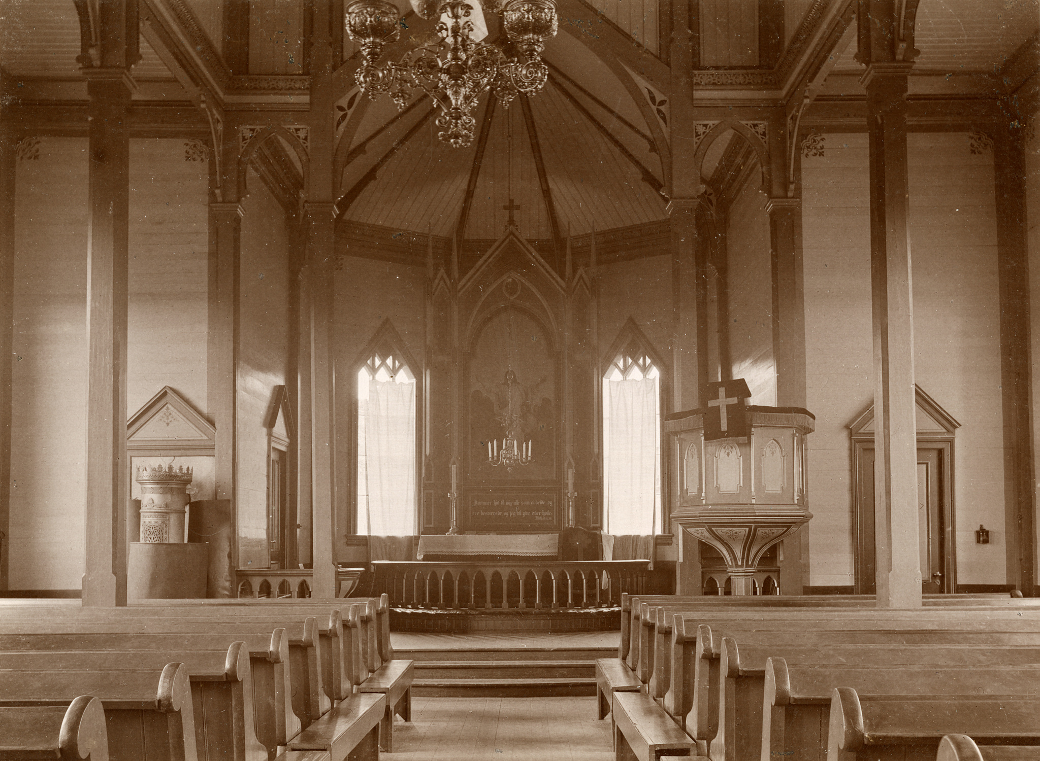 Interiør i Austevoll kirke. Foto: Christian Christensen Thomhav, fra Kulturminnebilder.no.